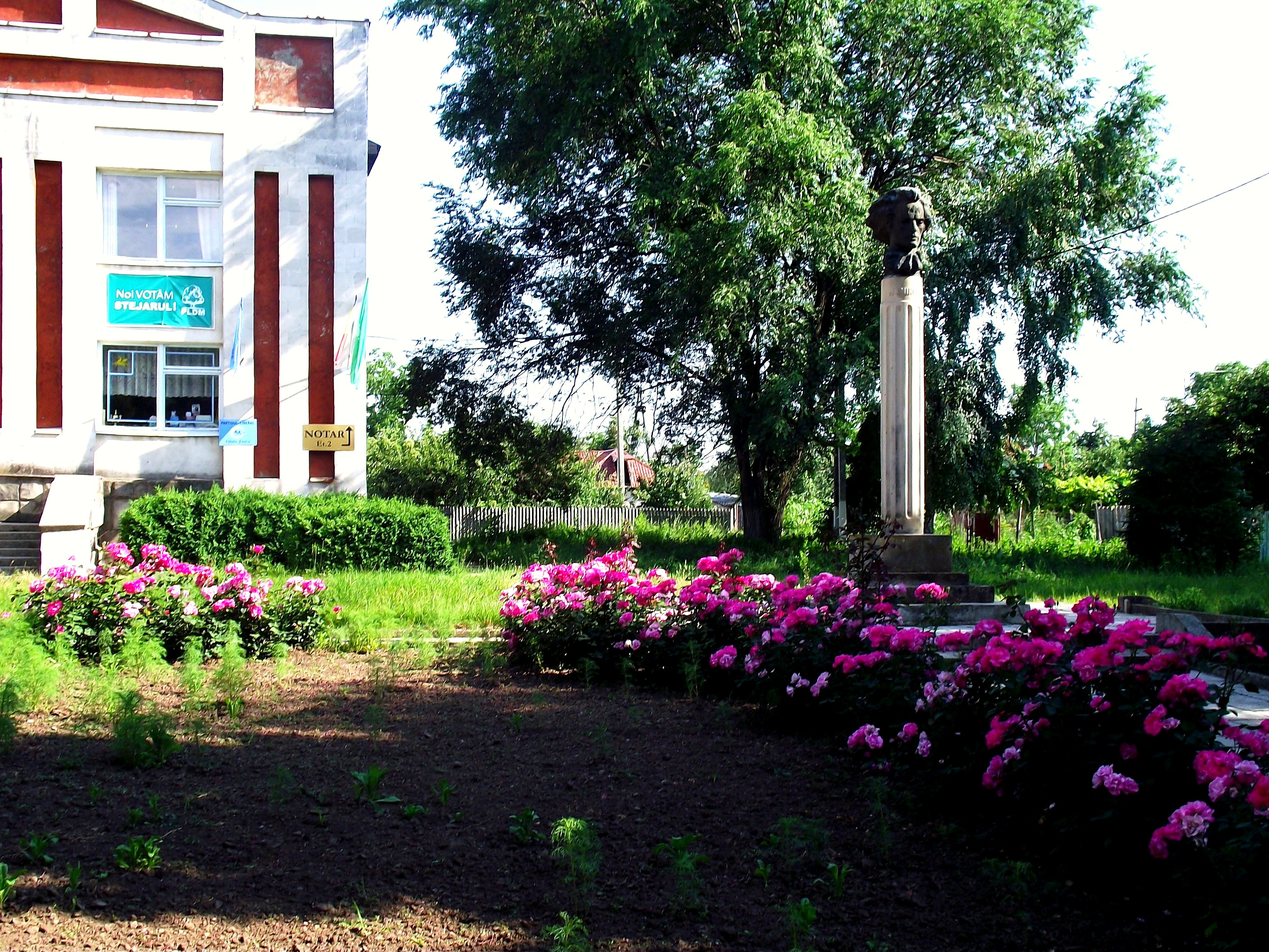 Leova, Moldova